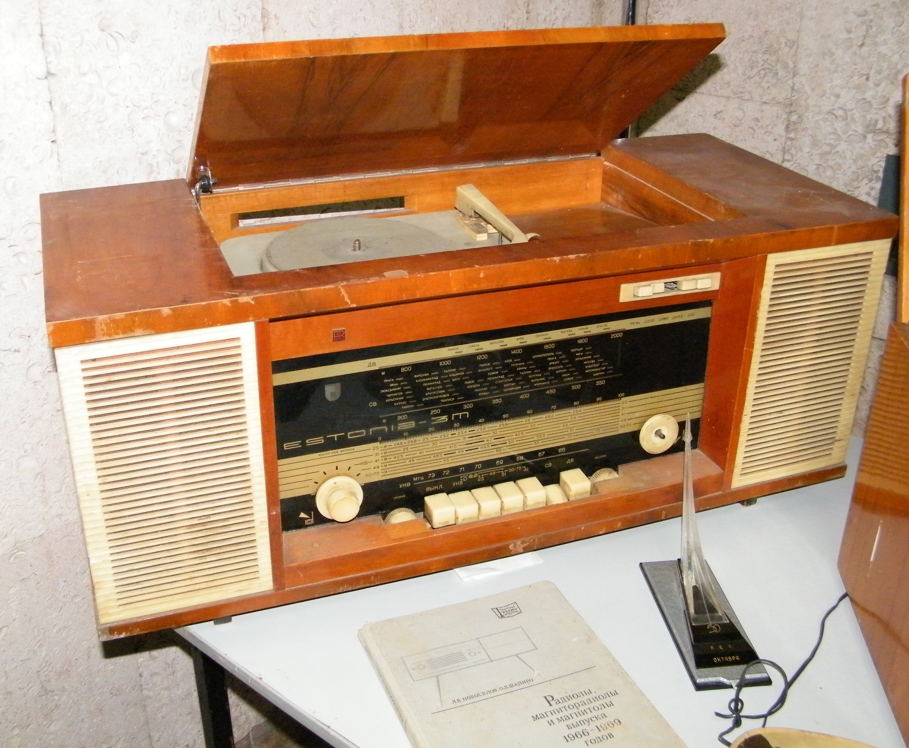 Теплый ламповый звук